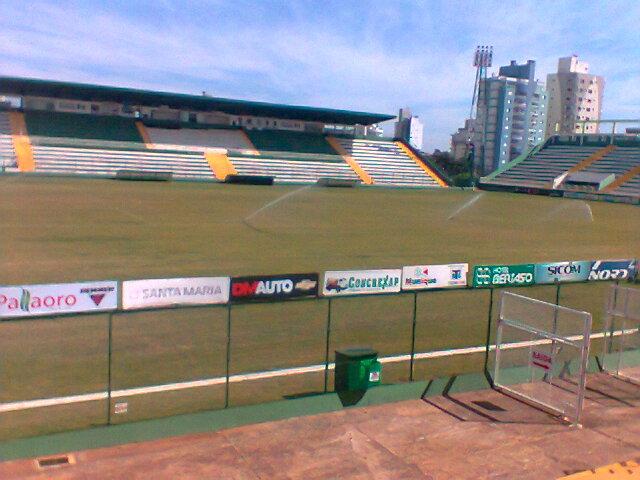 Arena Condá: Novo gramado